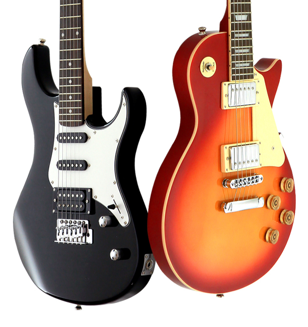 RDRは、新進気鋭のエレキギター、ベースブランド。